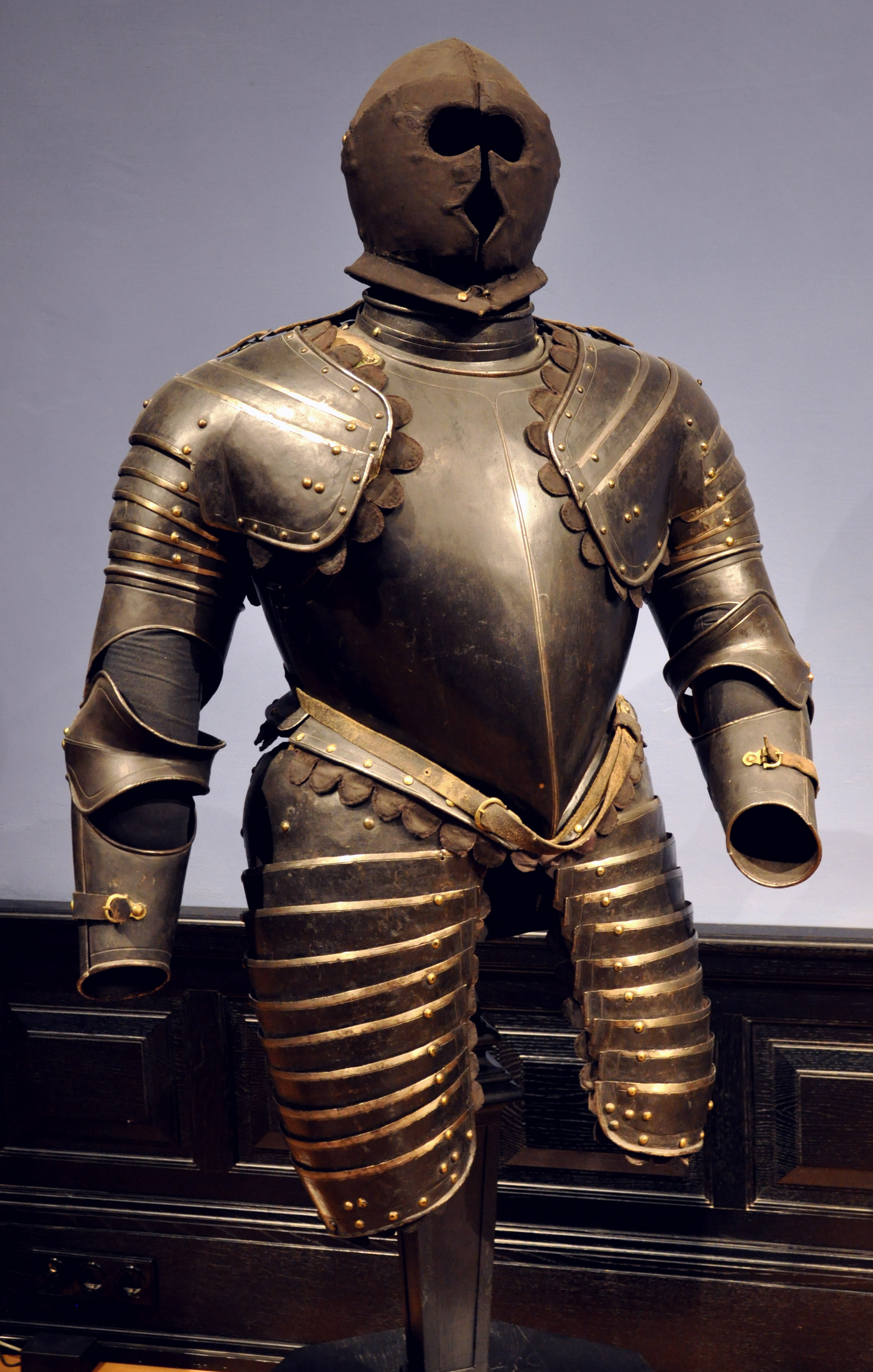 Wien, Kunsthistorisches Museum, Hofjagd- und Rüstkammer (Neue Burg), Inv. Nr. A 1701 Küriss des Karl III. Herzog von Lothringen (1543–1608), Frankreich 1580/1590 (laut Beschreibungstafel "Karl II." mit diesen Daten)